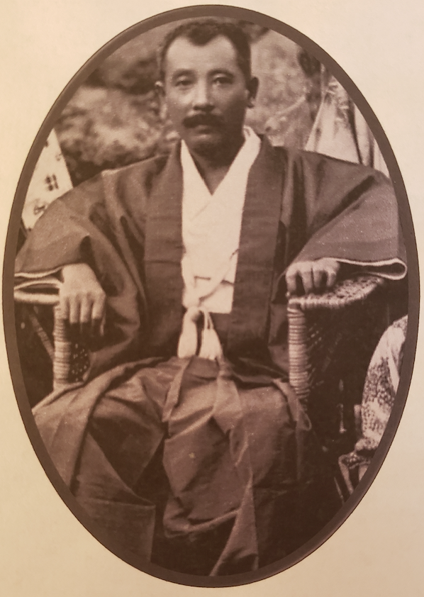 荒田武卿邸にて